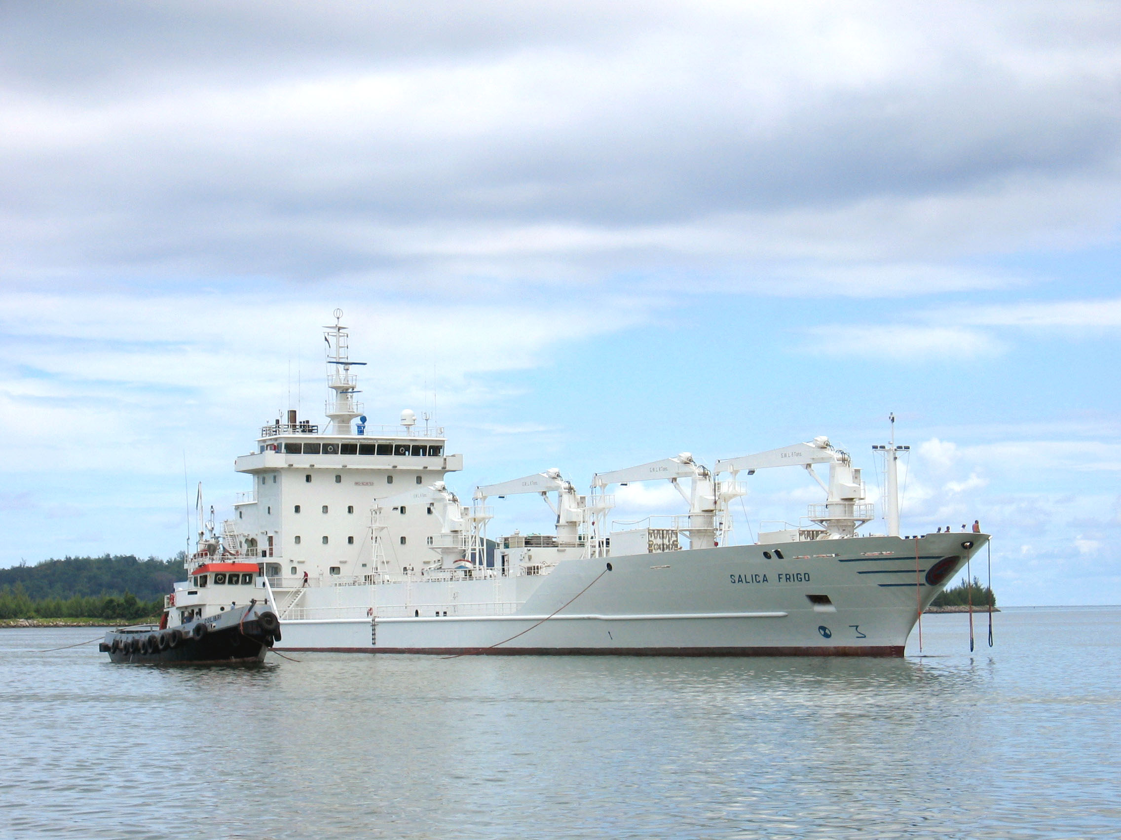 Reefer vessel